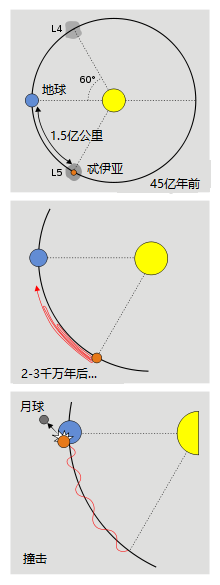 月球形成示意图